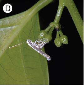 Epicephala lanceolatella